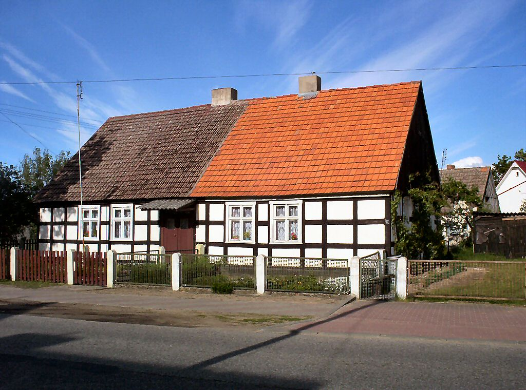 Tanowo ul. Szczecińska 67 - budynek ryglowy 11.1977.